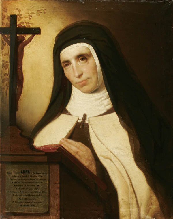 Франс де Вильд (France de Wilde, 1840-1918). Портрет блаженной Анны святого Варфоломея (1917)